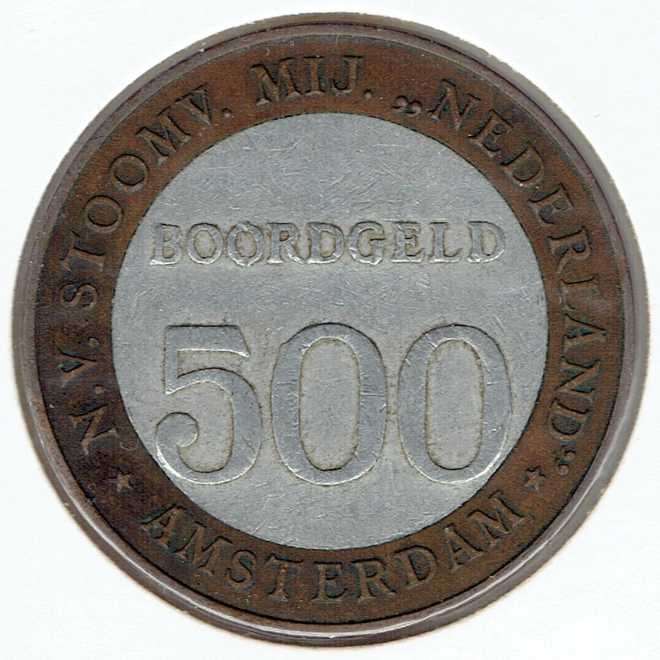 Boordgeld Stoomvaart Maatschappij Nederland. 500 cent aluminium, vierkant - voorzijde